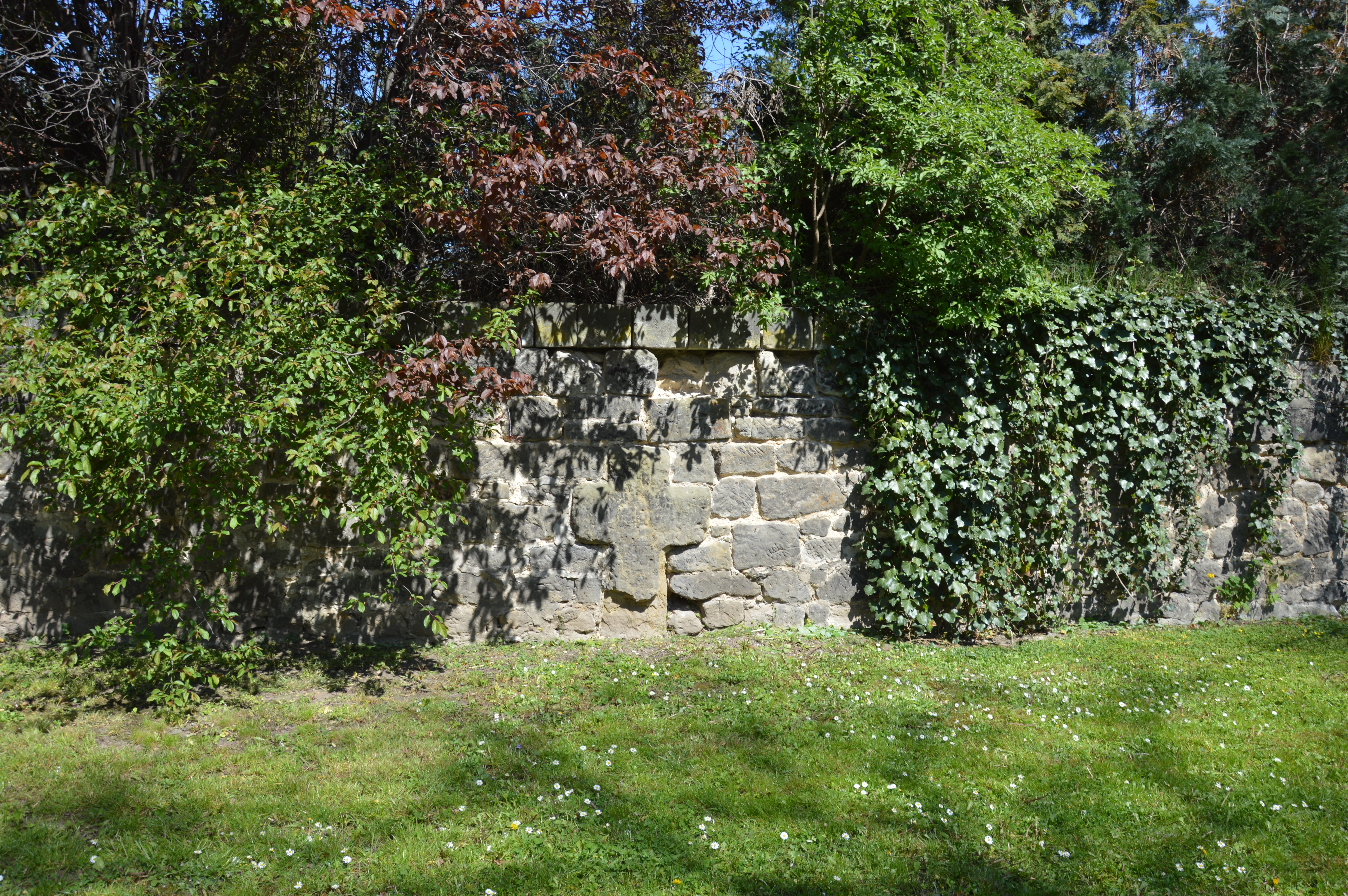 Kreuz Adelheidstraße 26 Quedlinburg